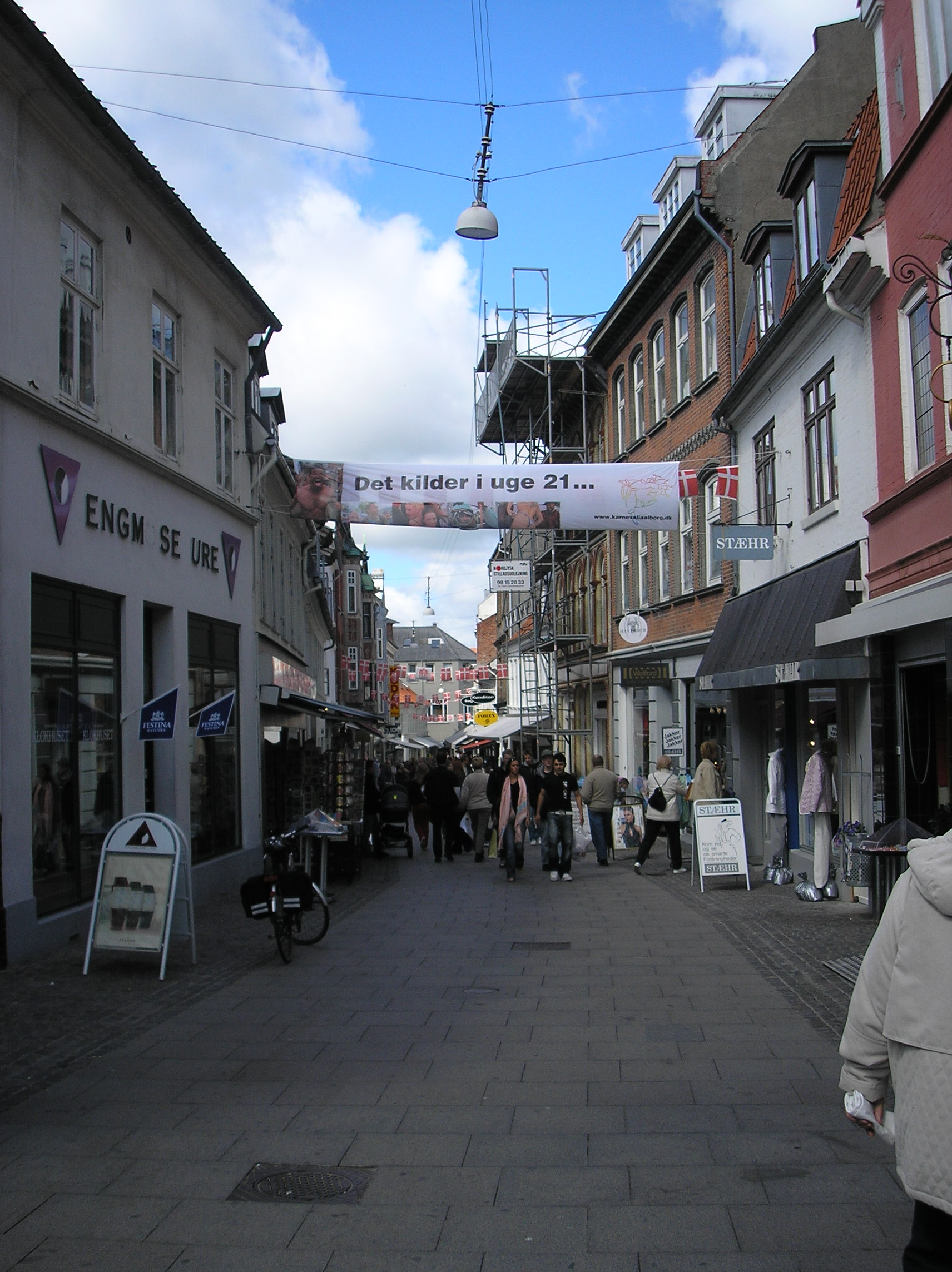 Foto tomada por Jorge González González. Picture taken by Jorge González González.